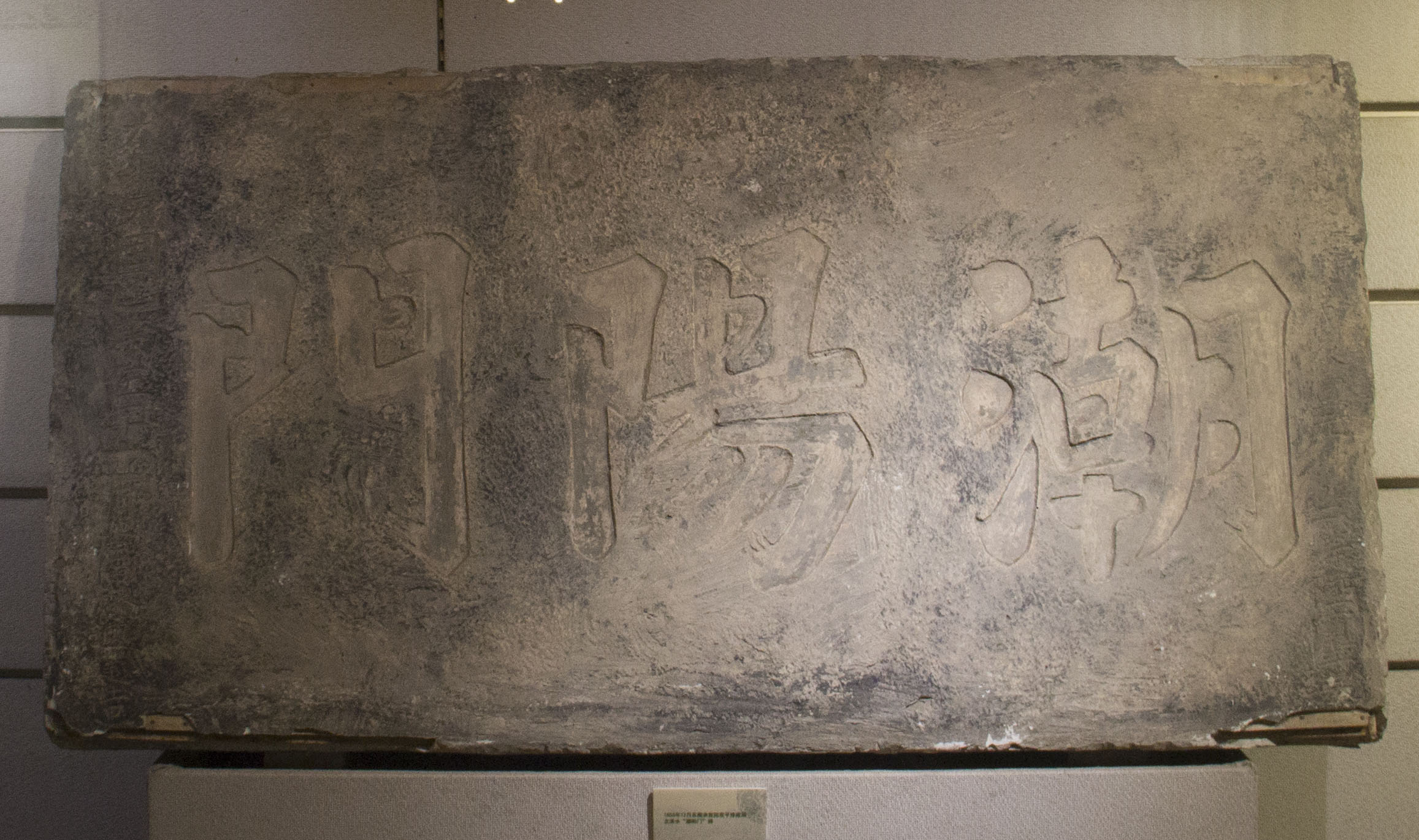 藏於太平天國紀念館。𥖎石橫匾，長1.44米，寬0.76米，厚0.13米[1]。